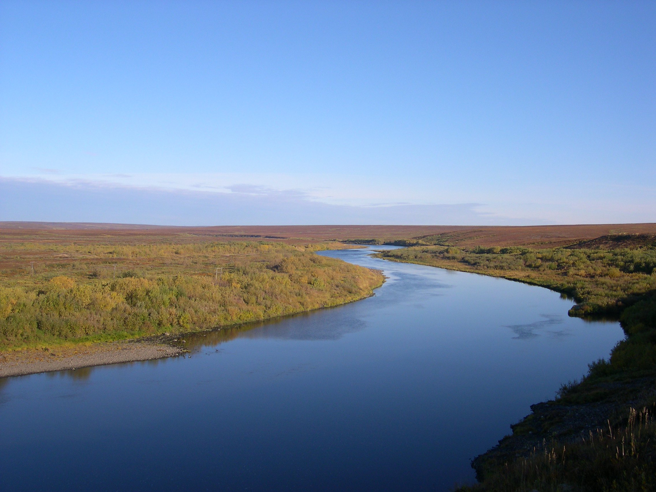 Река Воркута в месте её пересечения ж/д Воркута-Инта близ устья реки Юньяха. Снимок сделан в направлении против течения.